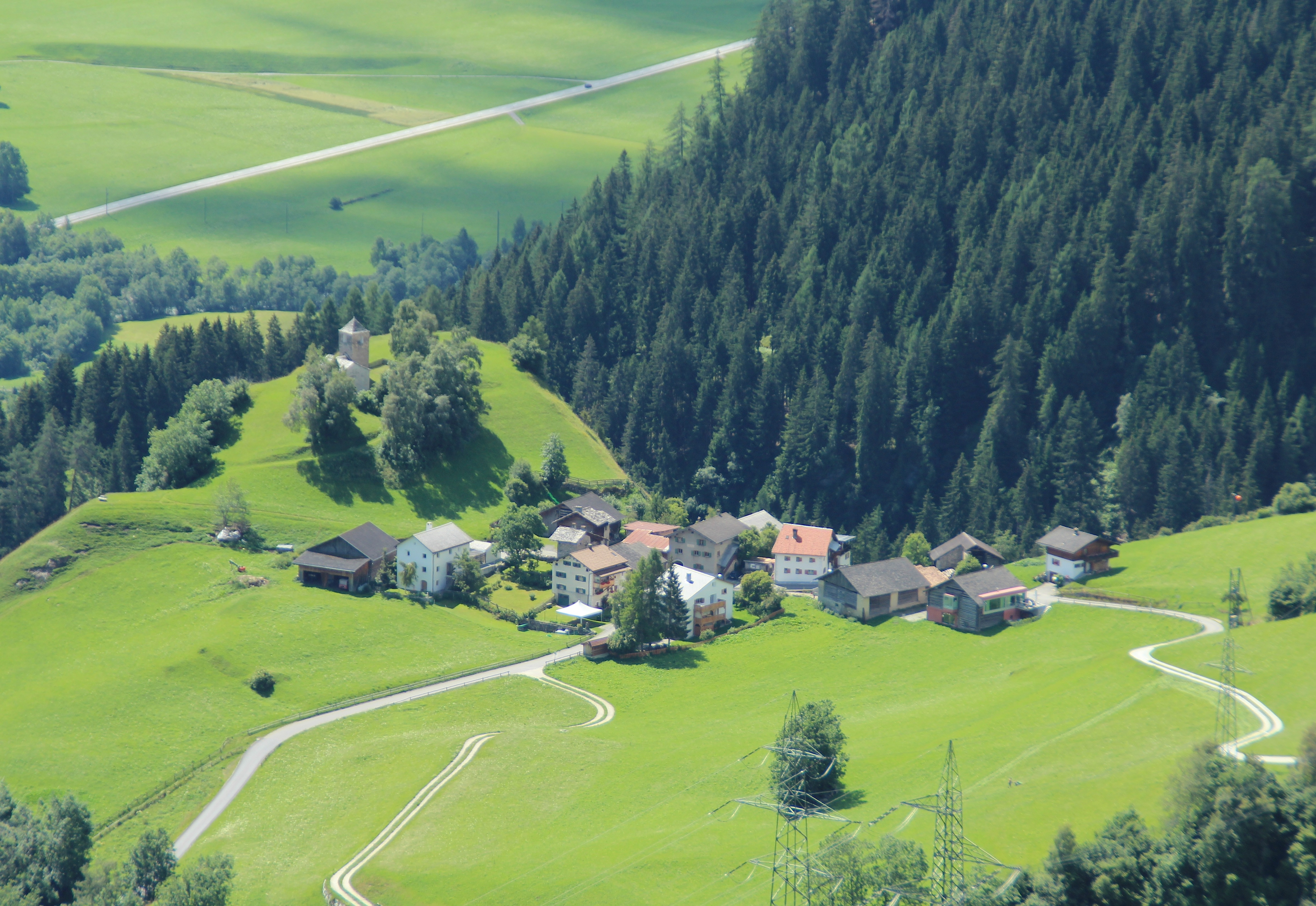 Casti GR